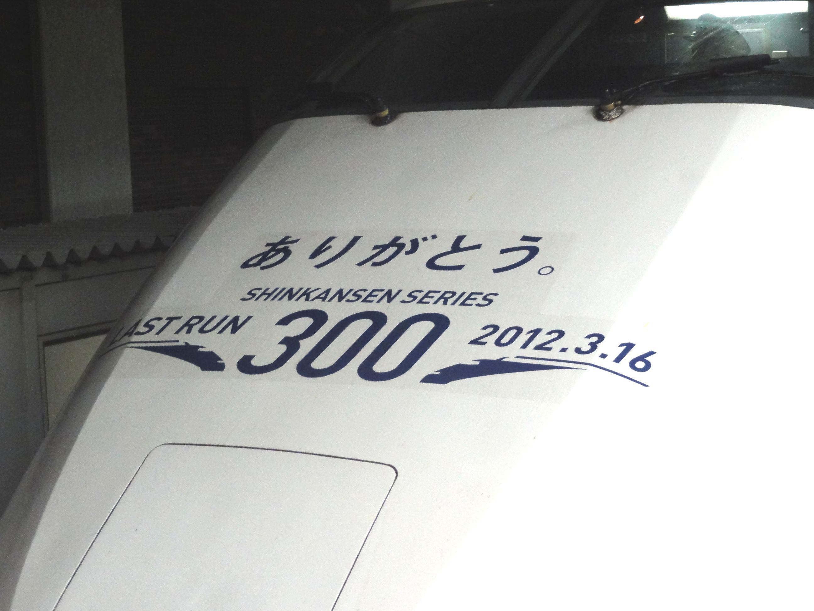 さよなら東海道新幹線300系先頭車特別塗装